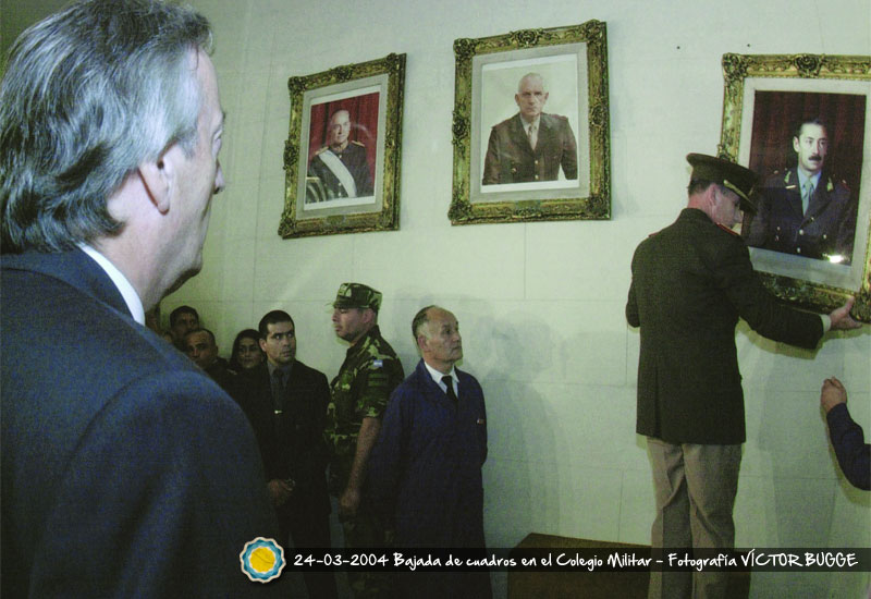 El presidente Néstor Kirchner ordenó que se descolgaran los cuadros de los genocidas Jorge Rafael Videla y Reynaldo Bignone del Colegio Militar en El Palomar.